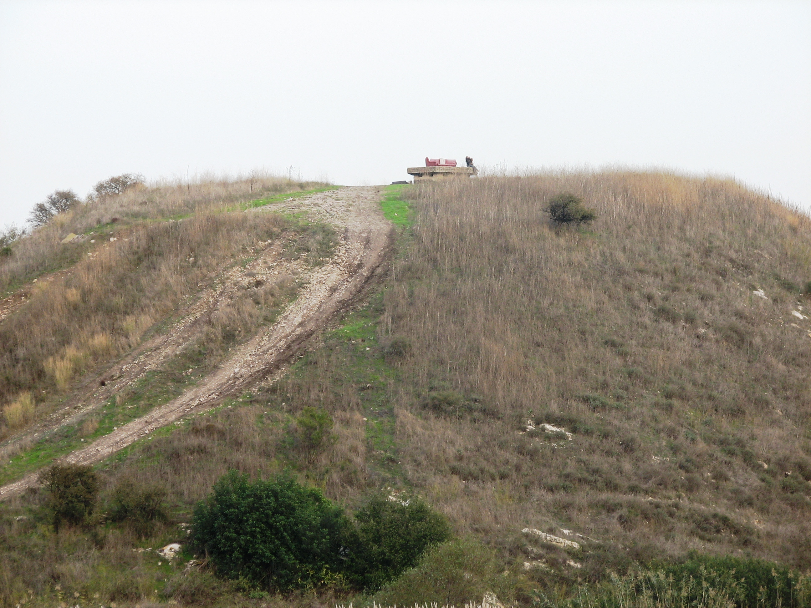 Tell Kashish Tell Kashish פסגת תל קשיש